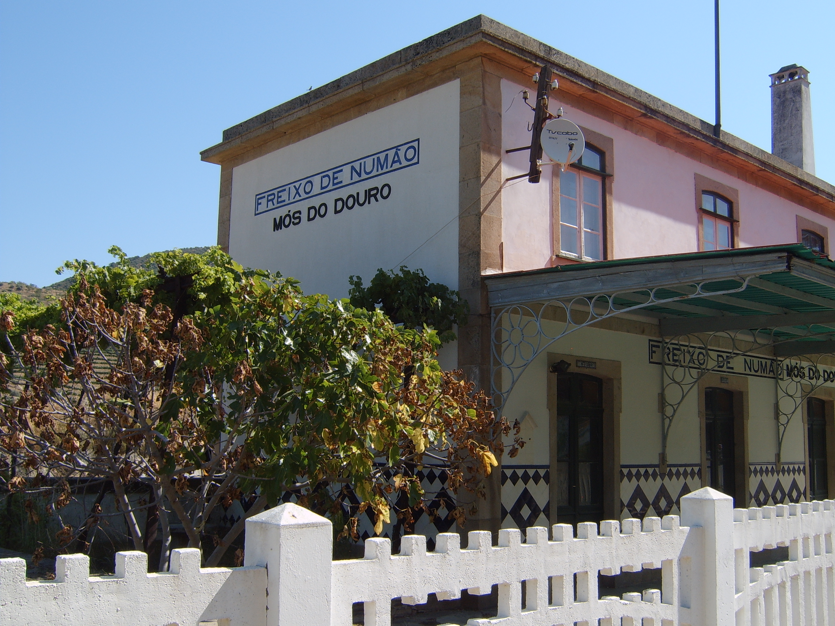 Antiga estação ferroviaria de Freixo de Numão-Mós do Douro. Concelho de Vila Nova de Foz Côa.